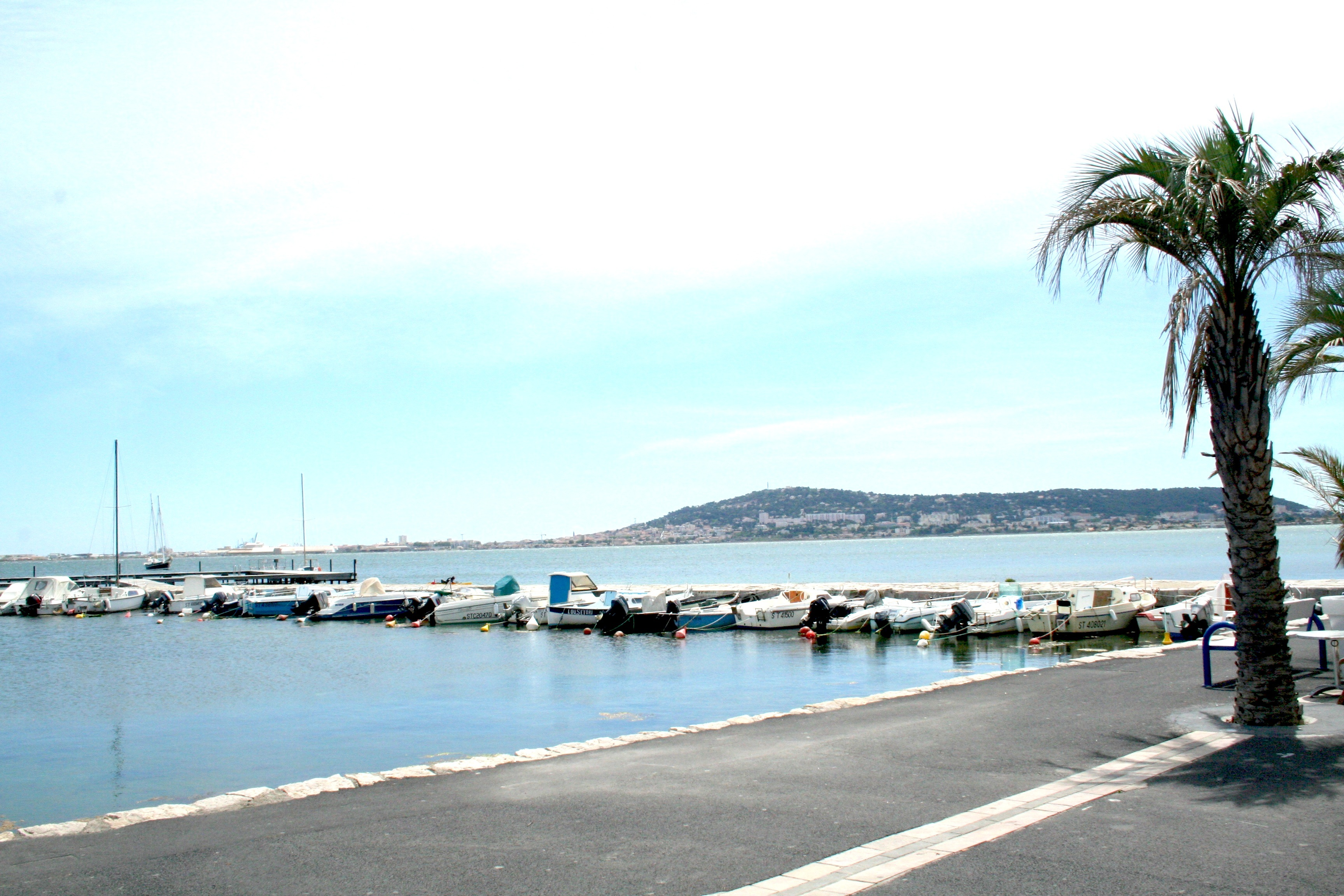 Balaruc-les-Bains (Hérault) - rive de l'Étang de Thau. Vue sur Sète.